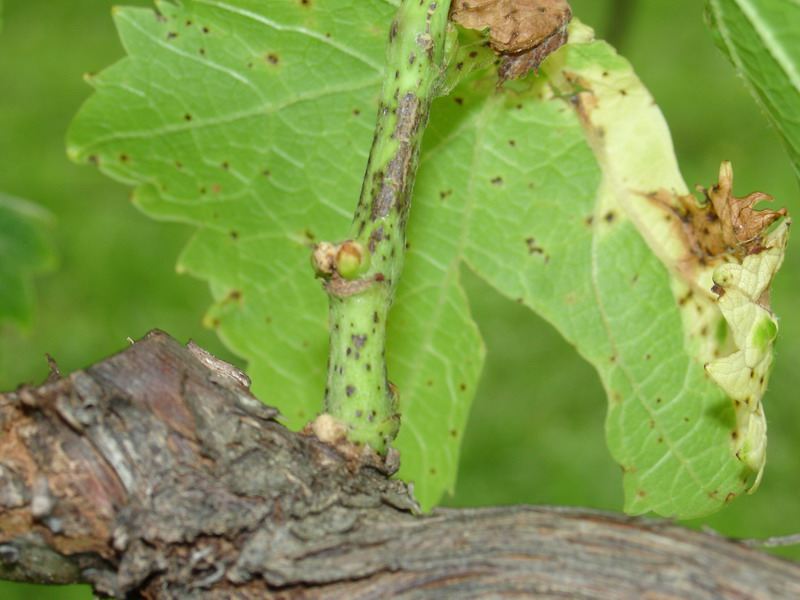 Primer Črne pegavosti na vinski trti.